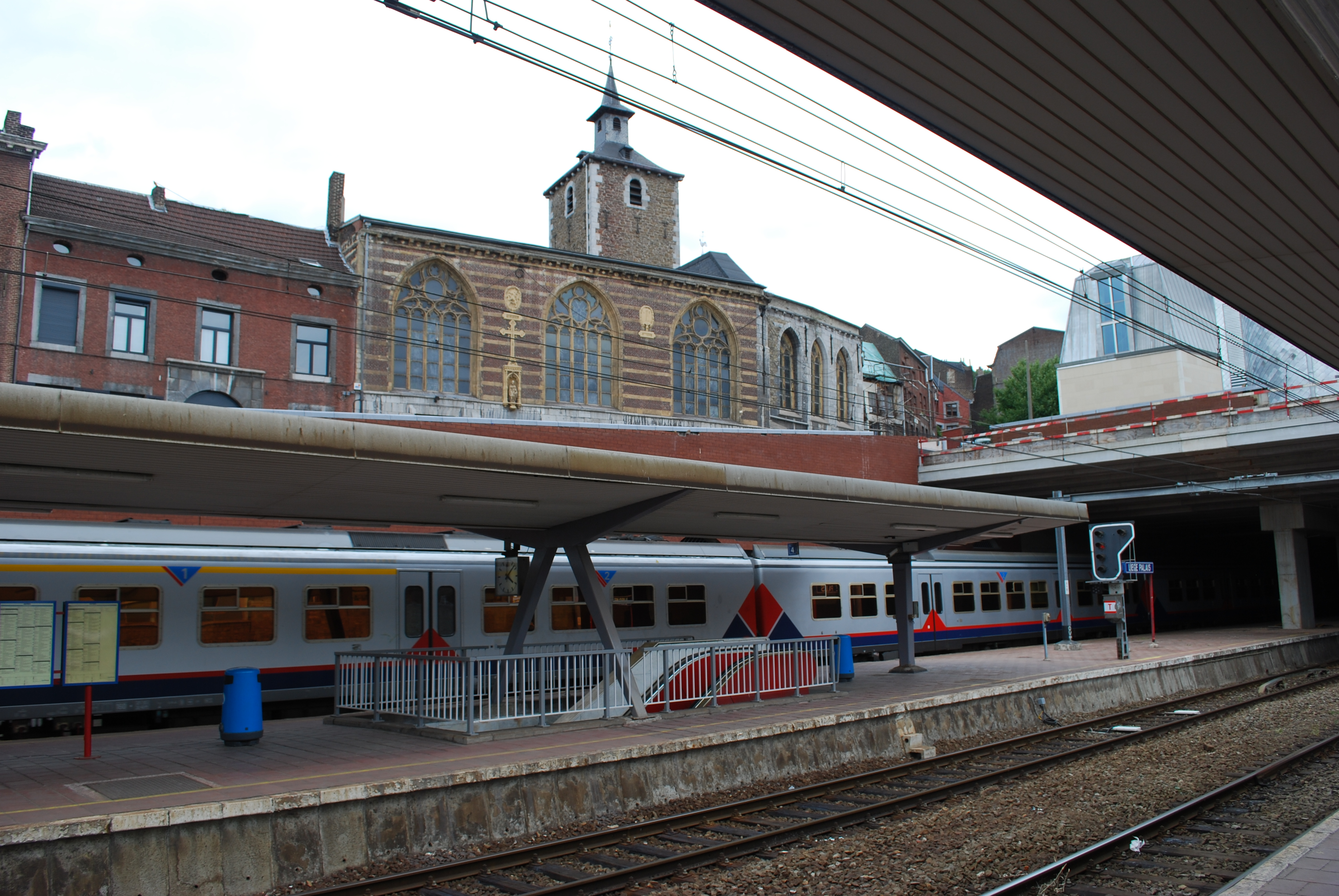 La gare du Palais à Liège, vue vers l'église Saint-Servais en surplomb.